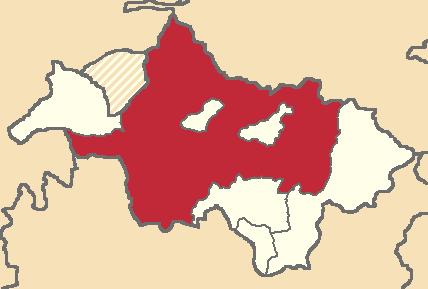 Mapa localizacor del cantón en Cañar, Ecuador